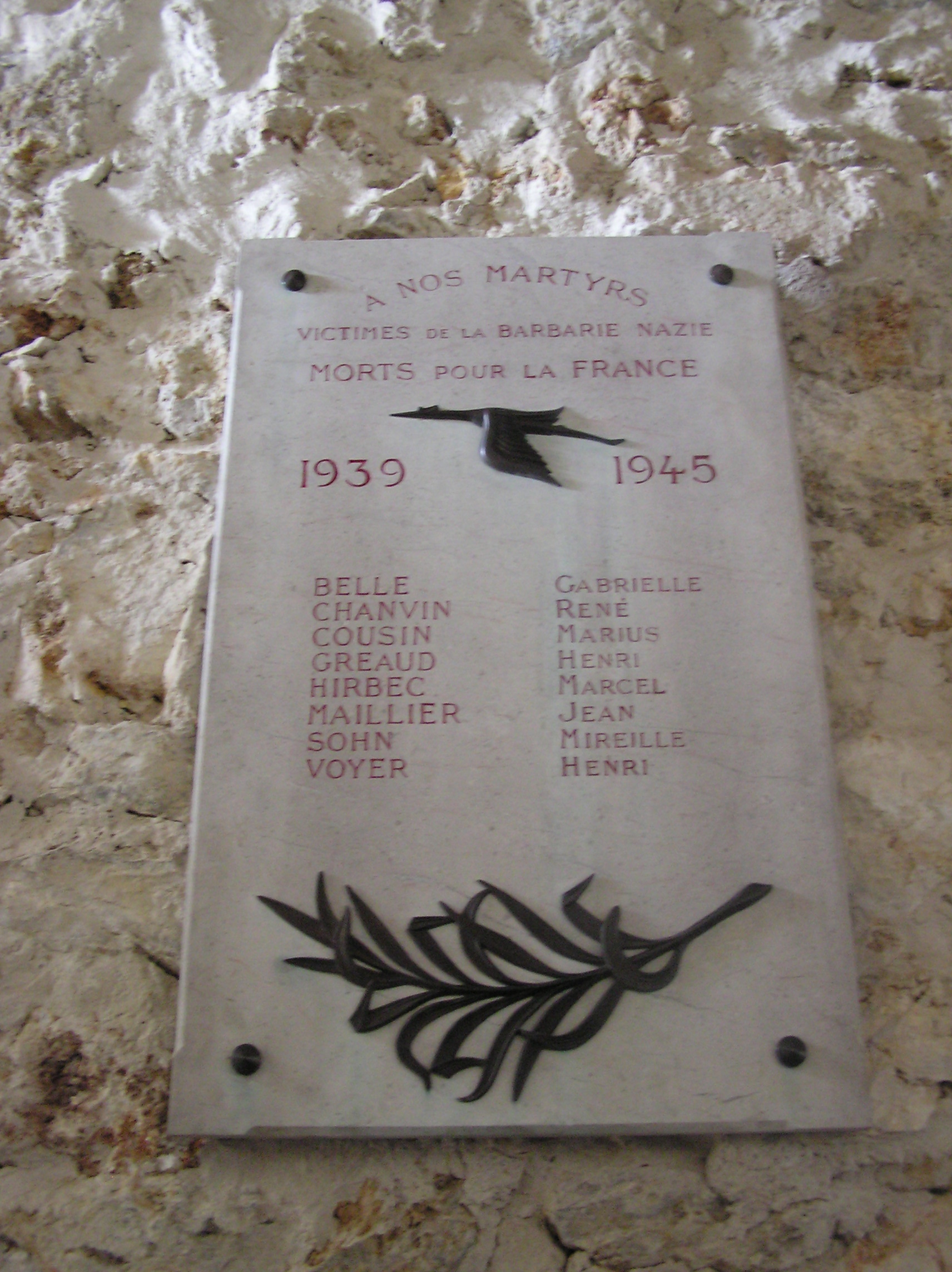 Plaque commémorative du personnel de l'usine Hispano Suiza victimes de la barbarie Nazie